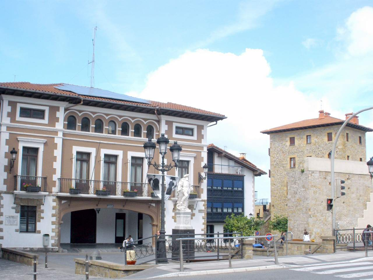 Ayuntamiento de Getaria (Gipúzkoa)